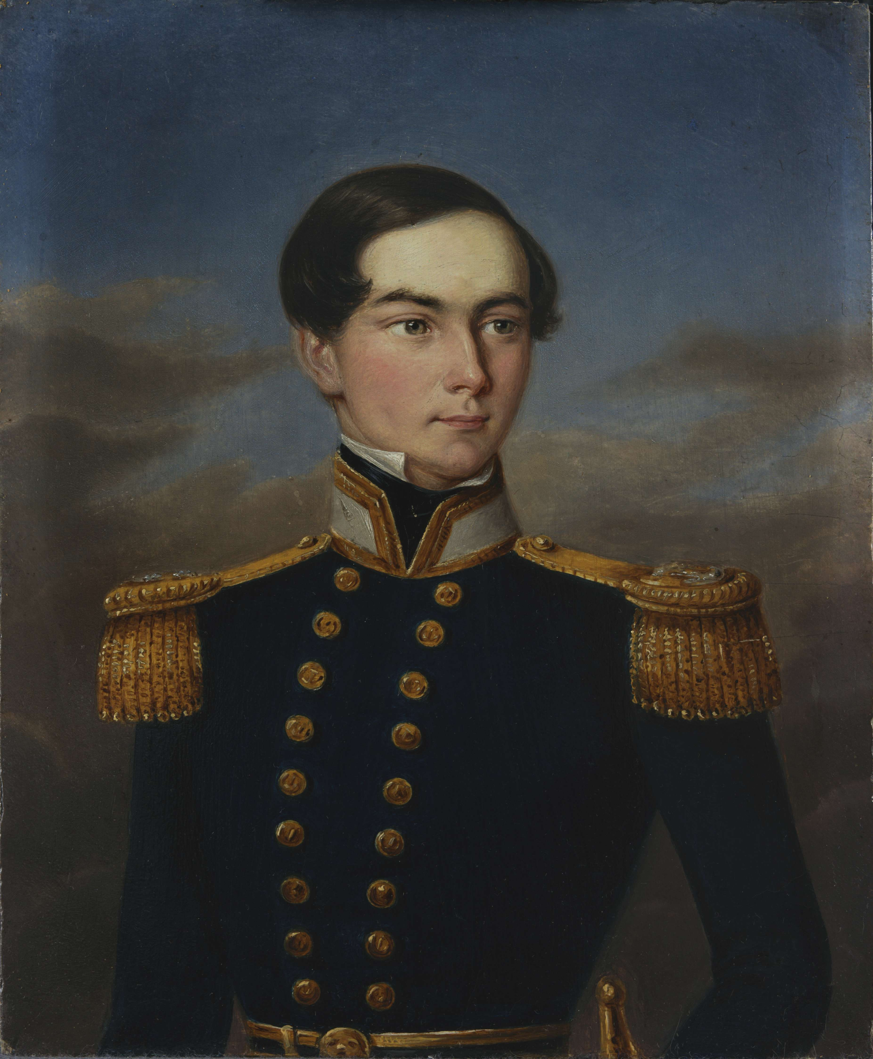 Prinz Wilhelm Friedrich Ernst von Hessen-Philippsthal-Barchfeld (1831-1890) war ein Sohn des Landgrafen Karl August Philipp Ludwig von Hessen-Philippsthal-Barchfeld und der Bruder des Prinzen Alexis